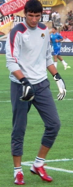 футболист Салахат Агаев (Азербайджан)